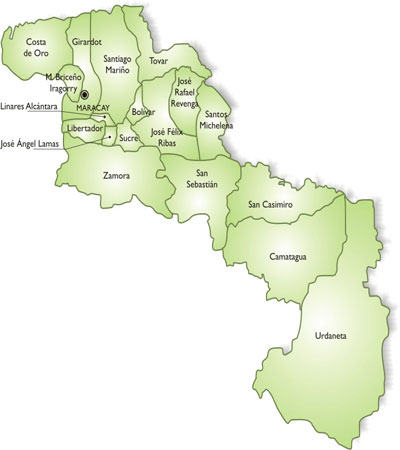 Aragua(Venezuela) Mapa municipal del estado Aragua